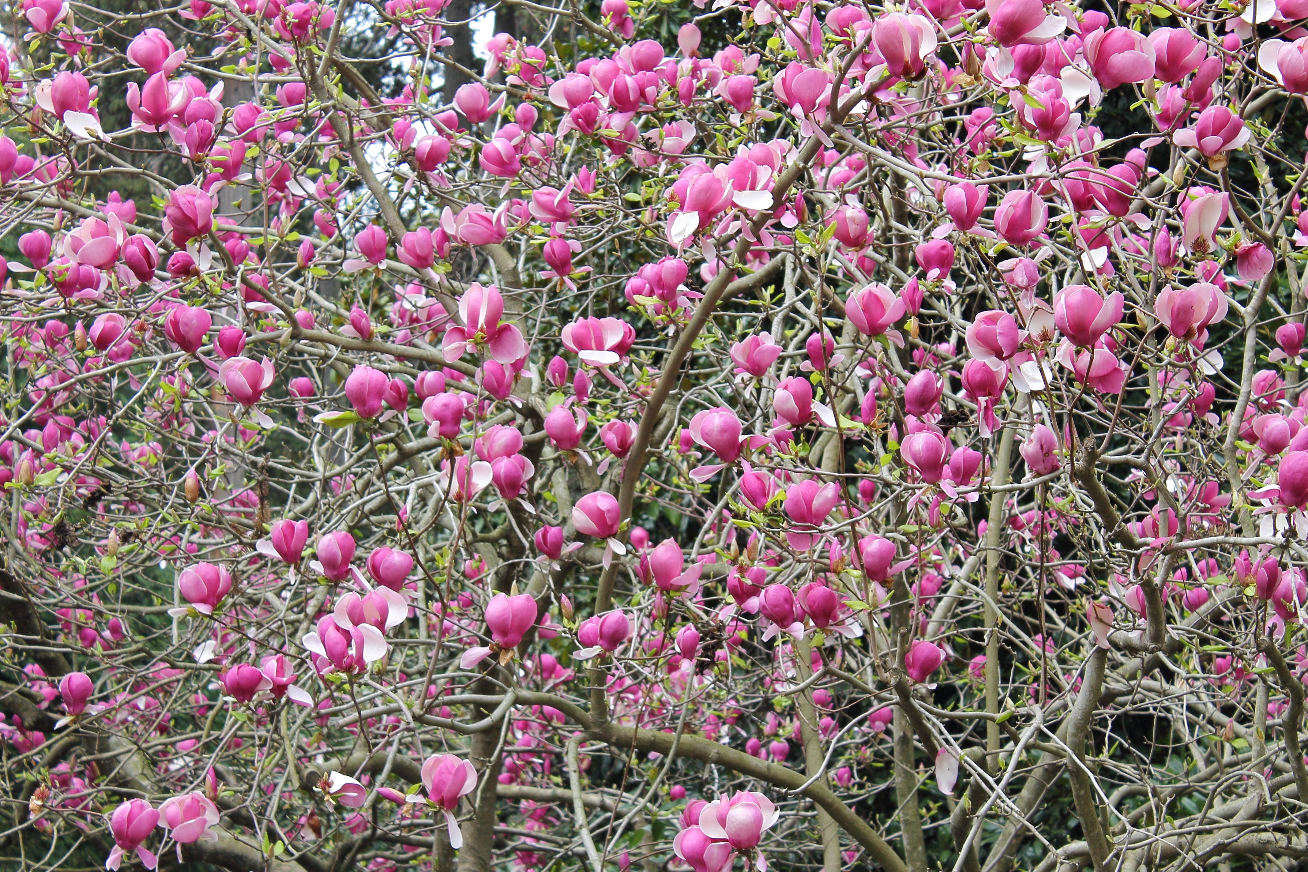 Магнолия крупноцветная, Сочи. Снимок сделан в дендрологическом парке "Южные культуры". This image is related to the protected area of Russia number 2310332